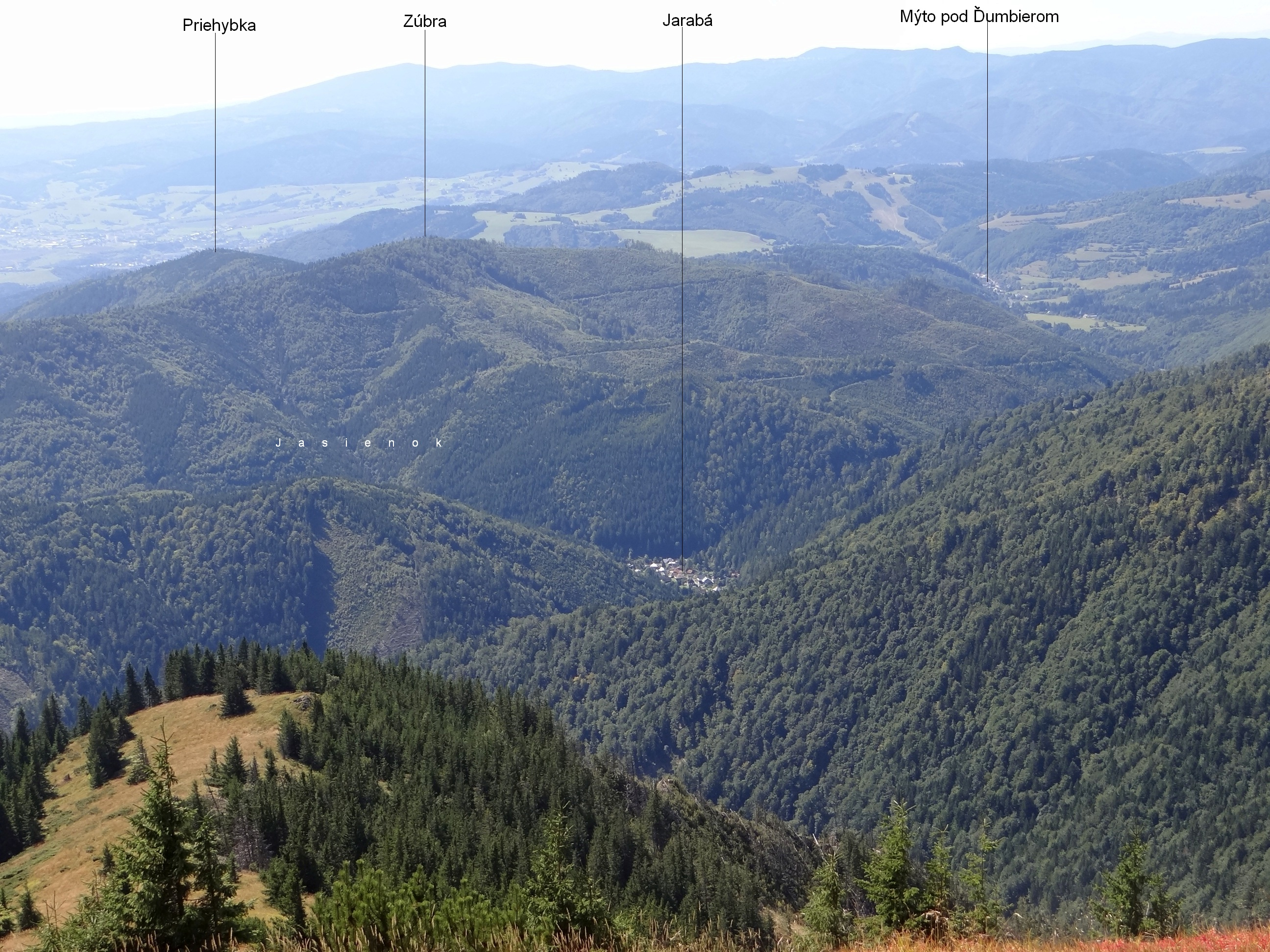 Widok od pólnocy na dolinę Štiavnička i wieś Jarabá